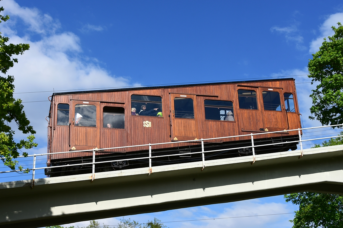 Voiture n° 1 descendante à l'approche de la station inférieure, franchissant le pont sur la Burgstallstraße.